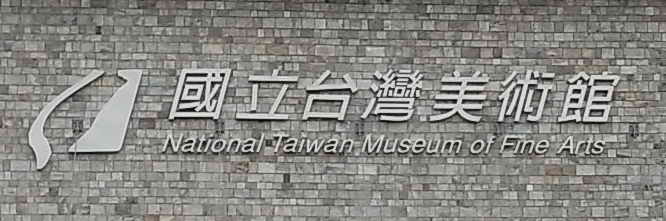 中文（台灣）: 國立台灣美術館門口館徽。